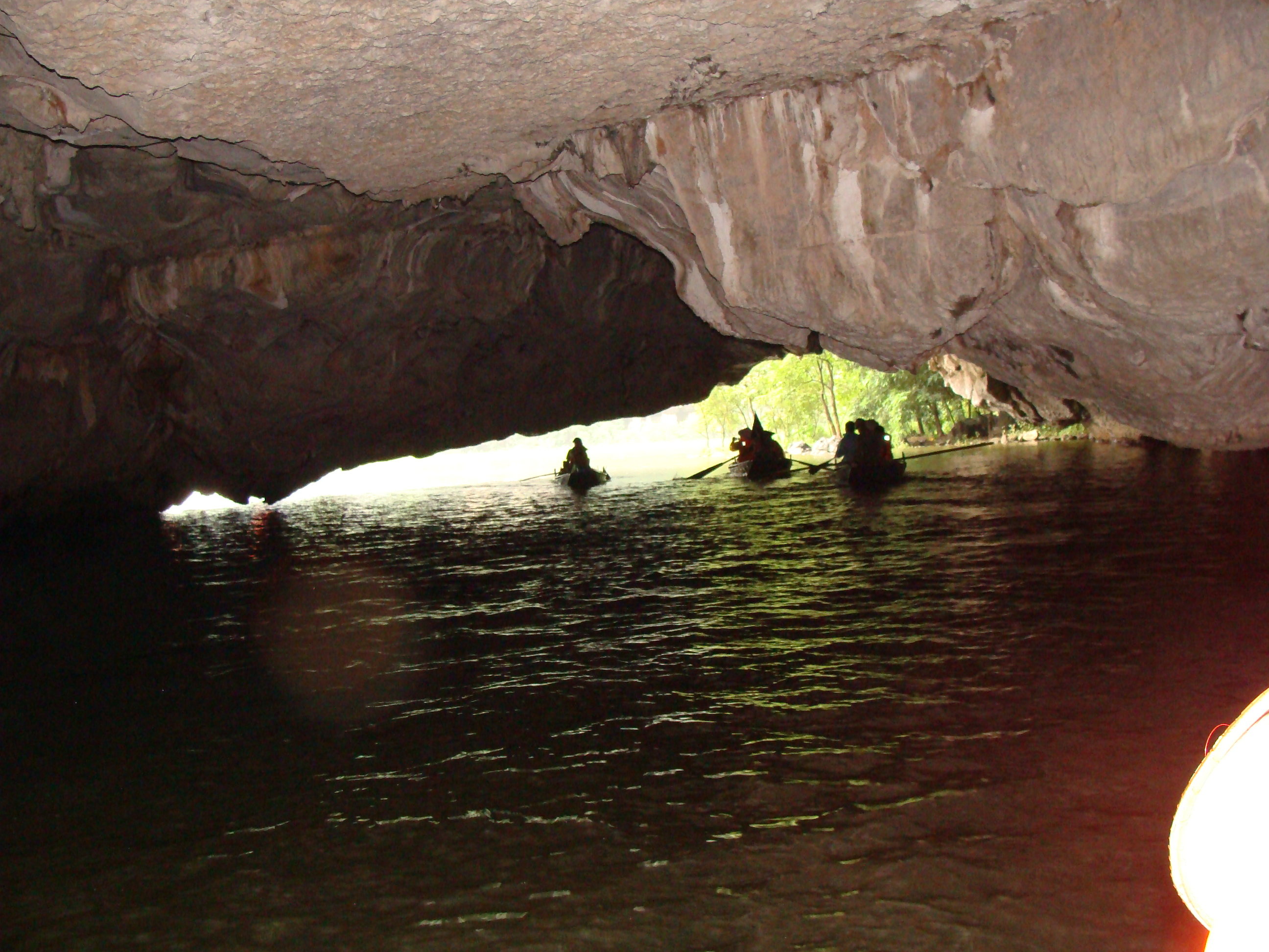 下龍灣景色二